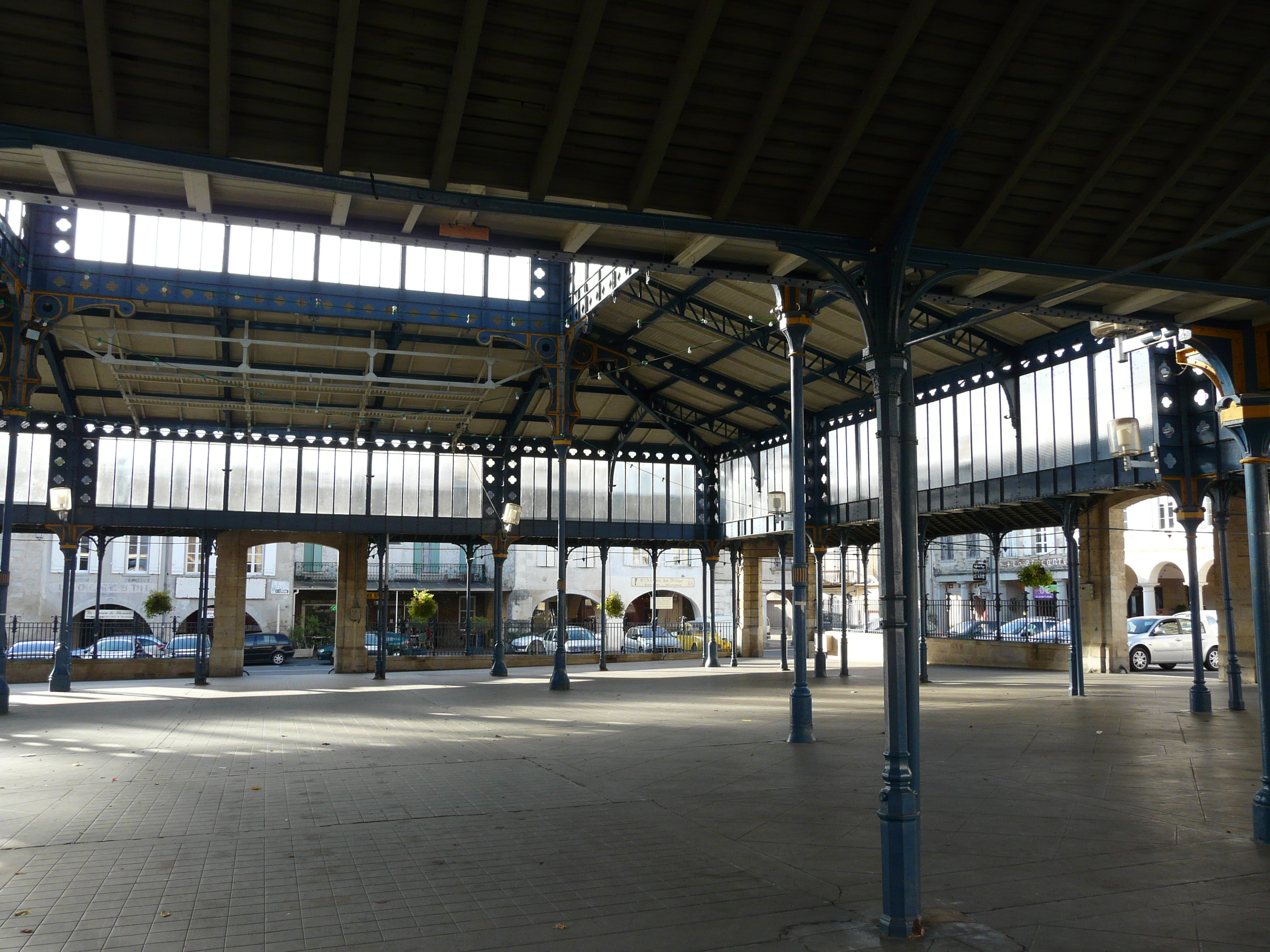 L'intérieur de la halle, Monségur, Gironde, France